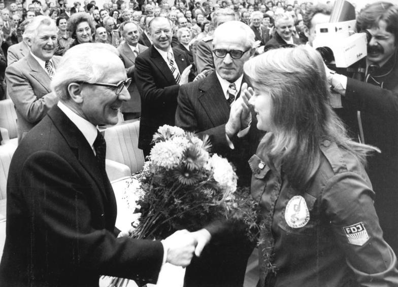 ADN-ZB Koard-29.10.76-kö Berlin: Volkskammertagung Nach der Wahl des Generalsekretärs des ZK der SED, Erich Honecker (l.), zum Vorsitzenden des Staatsrates der Deutschen Demokratsichen Republik gratulierte die 19-jährige Abgeordnete der FDJ-Fraktion, Heidi Bardölke, dem Generalsekretär des ZK der SED und Vorsitzenden des Staatsrates der DDR zu Wahl. Die junge Facharbeiterin für Textiltechnik überreichte dem neugewählten Staatsoberhaupt der DDR einen Strauß Blumen.